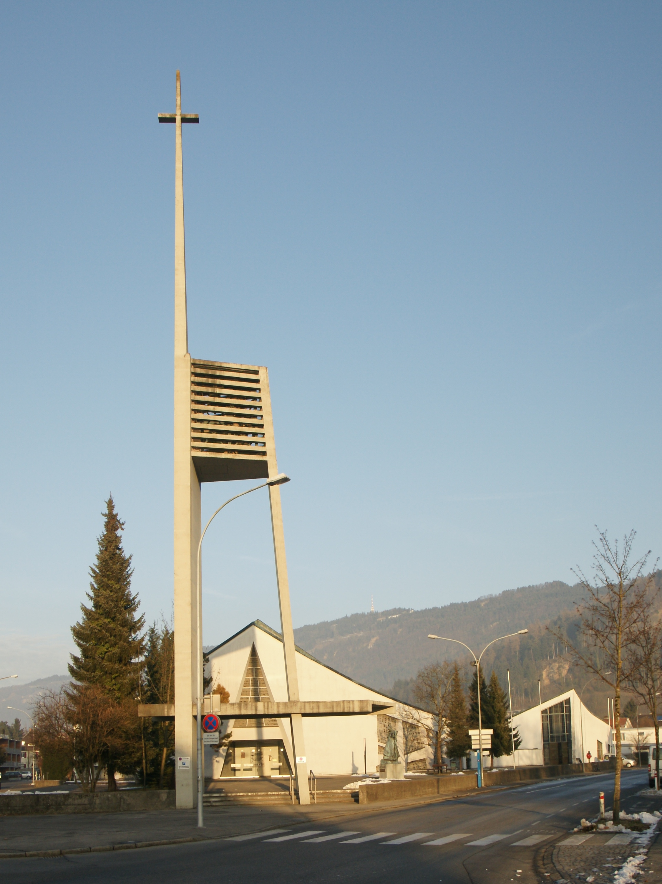 Kolumbankirche in Bregenz.